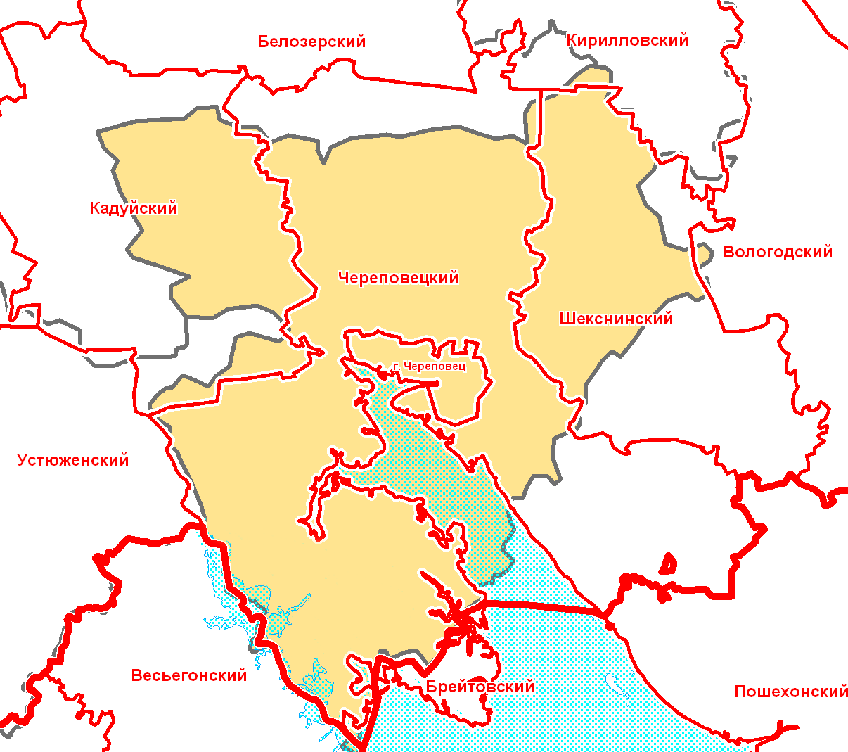 Череповецкий уезд Новгородской губернии в современной сетке районов